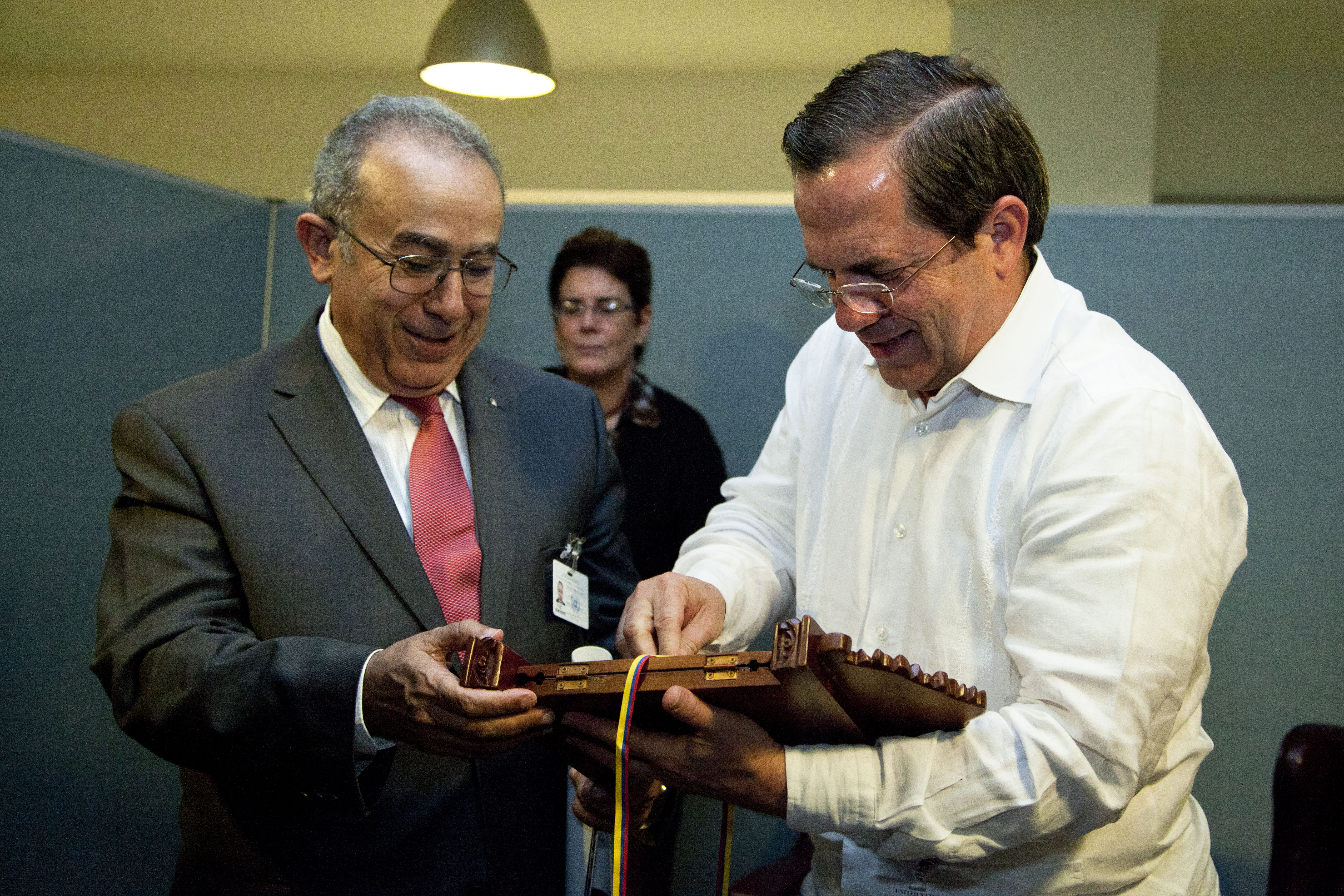 Nueva York (Estados Unidos). Los Cancilleres de Ecuador y Argelia, Ricardo Patiño y M. Ramtane Lamamra, mantuvieron una reunión bilateral en el marco de la 69 Asamblea General de Naciones Unidas. Foto: Fernanda LeMarie - Cancillería del Ecuador.